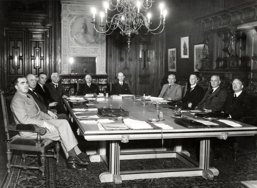 De eerste officiële zitting van het tweede kabinet De Geer aan een grote tafel in het Departement van Justitie, Den Haag 6 september 1939.